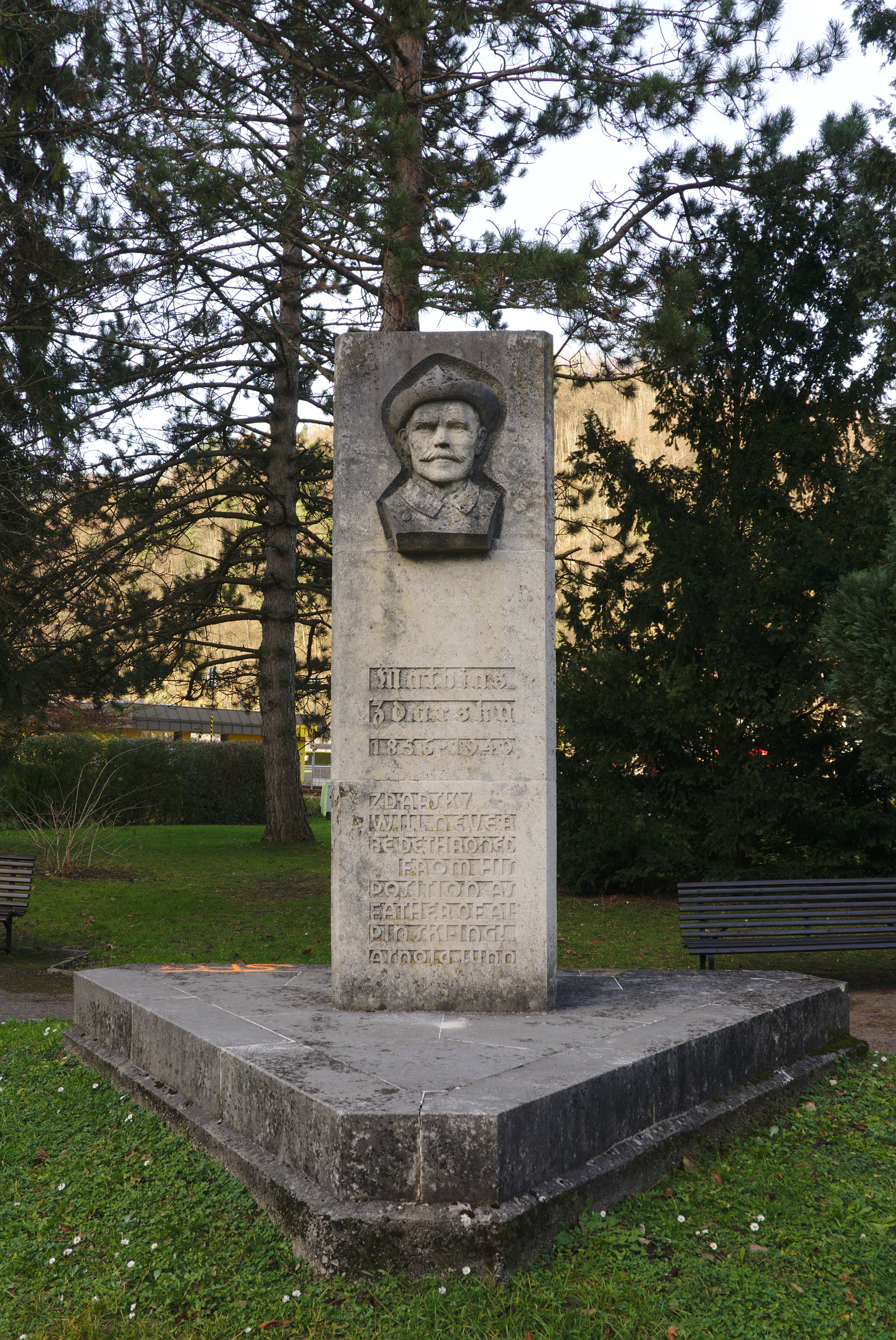 Mathias-Zdarsky-Denkmal in Lilienfeld geschaffen von Arnold Lunn